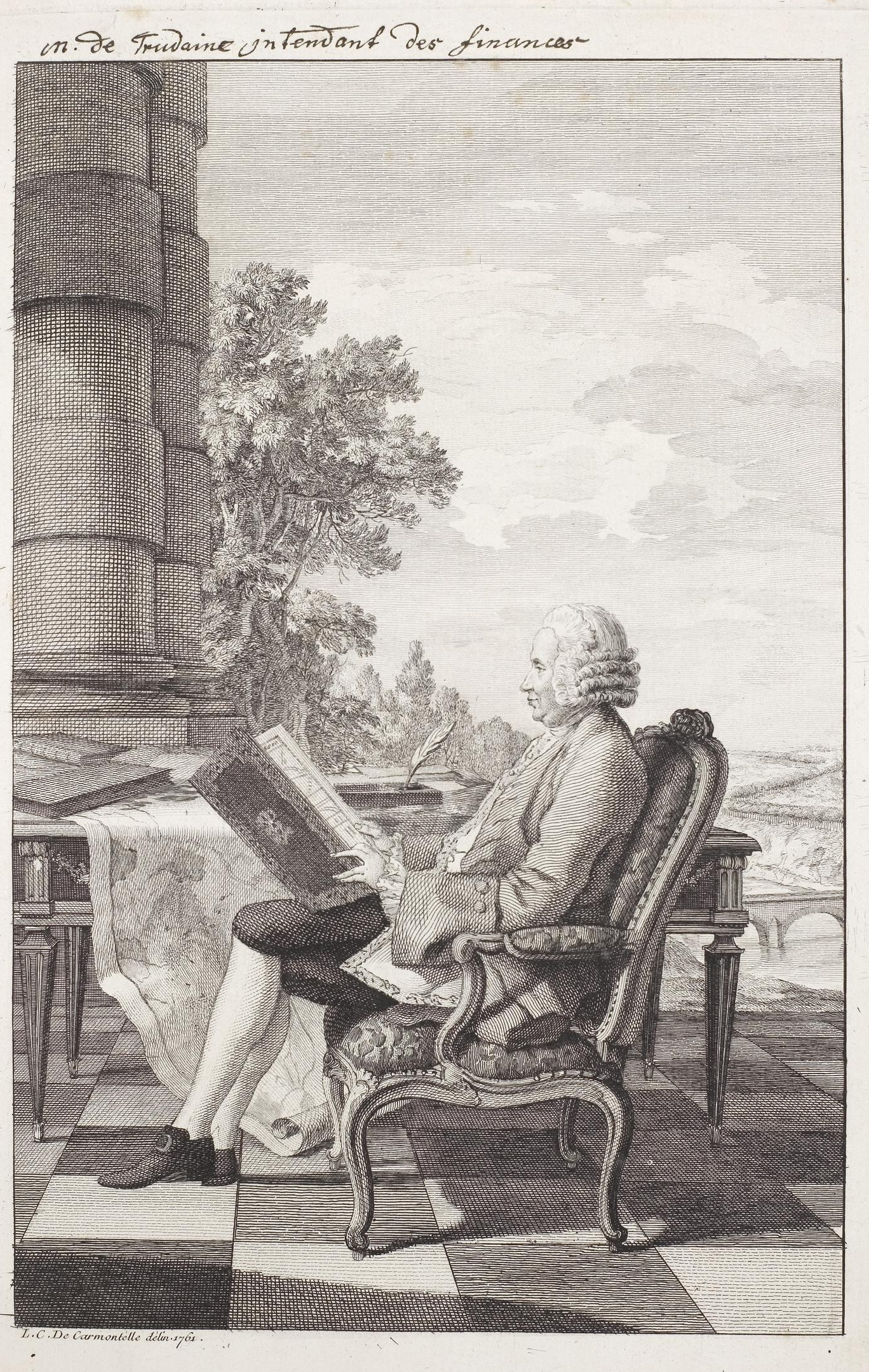 Grafik aus dem Klebeband Nr. 14 der Fürstlich Waldeckschen Hofbibliothek Arolsen Motiv: (handschriftlich:) "m. de Trudaine intendant des finances"